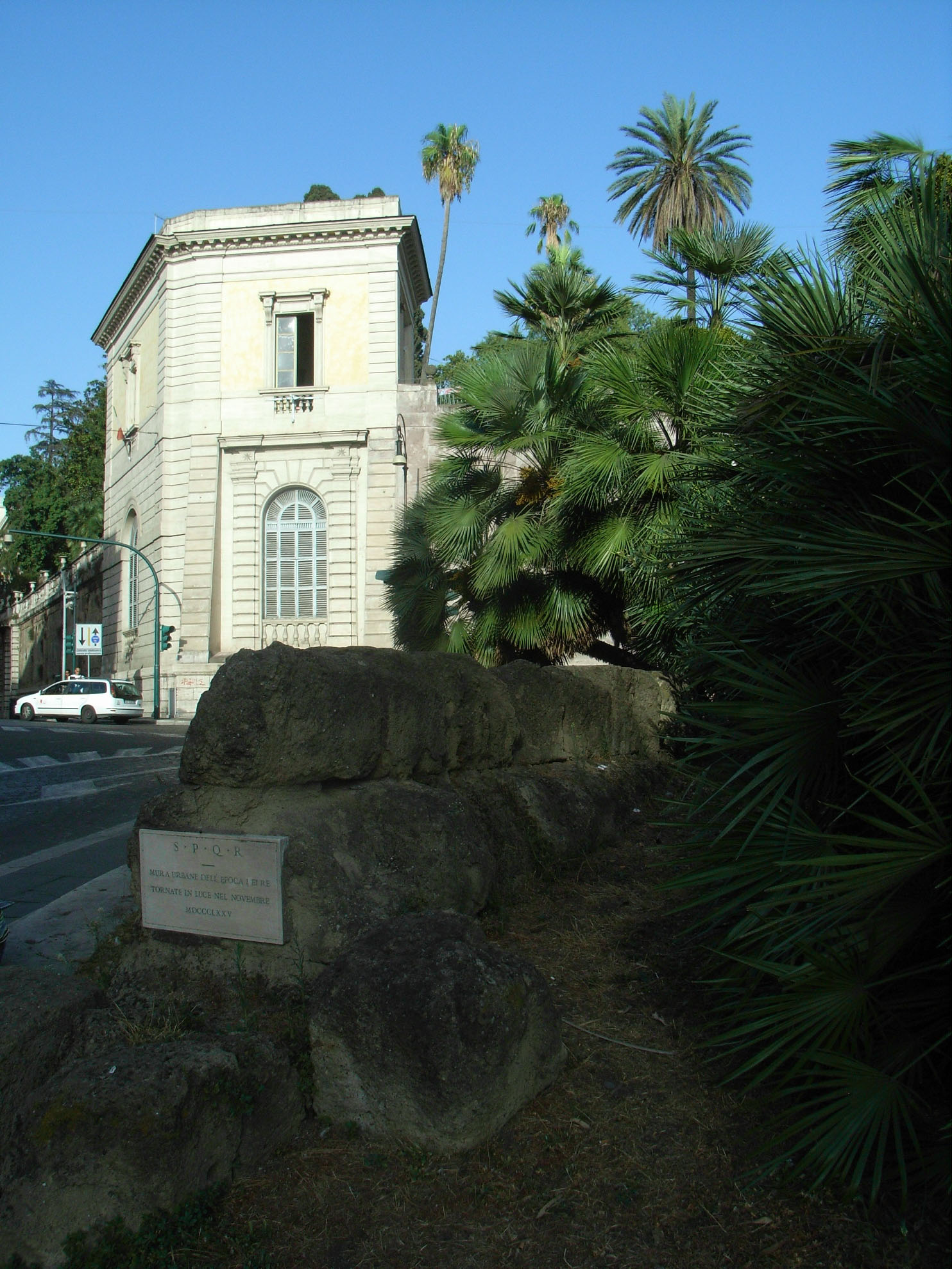 Roma, mura serviane e Villa Aldobrandini a largo Magnanapoli (via Nazionale)